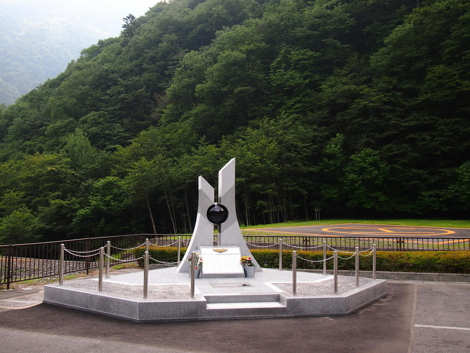 出会いの丘に建てられたあらかわ1墜落事故殉職者慰霊碑。2013/08/12撮影